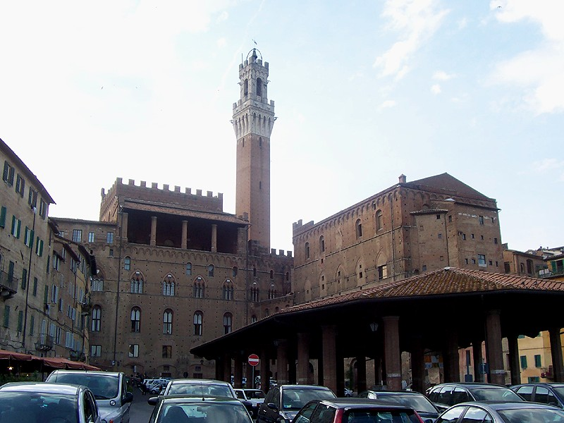 Siena - Piazza del Mercato